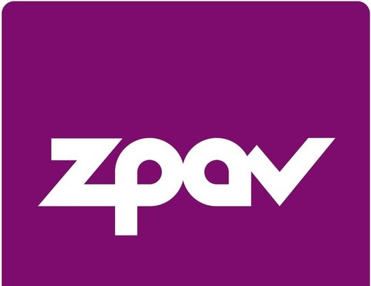 Logo der ZPAV